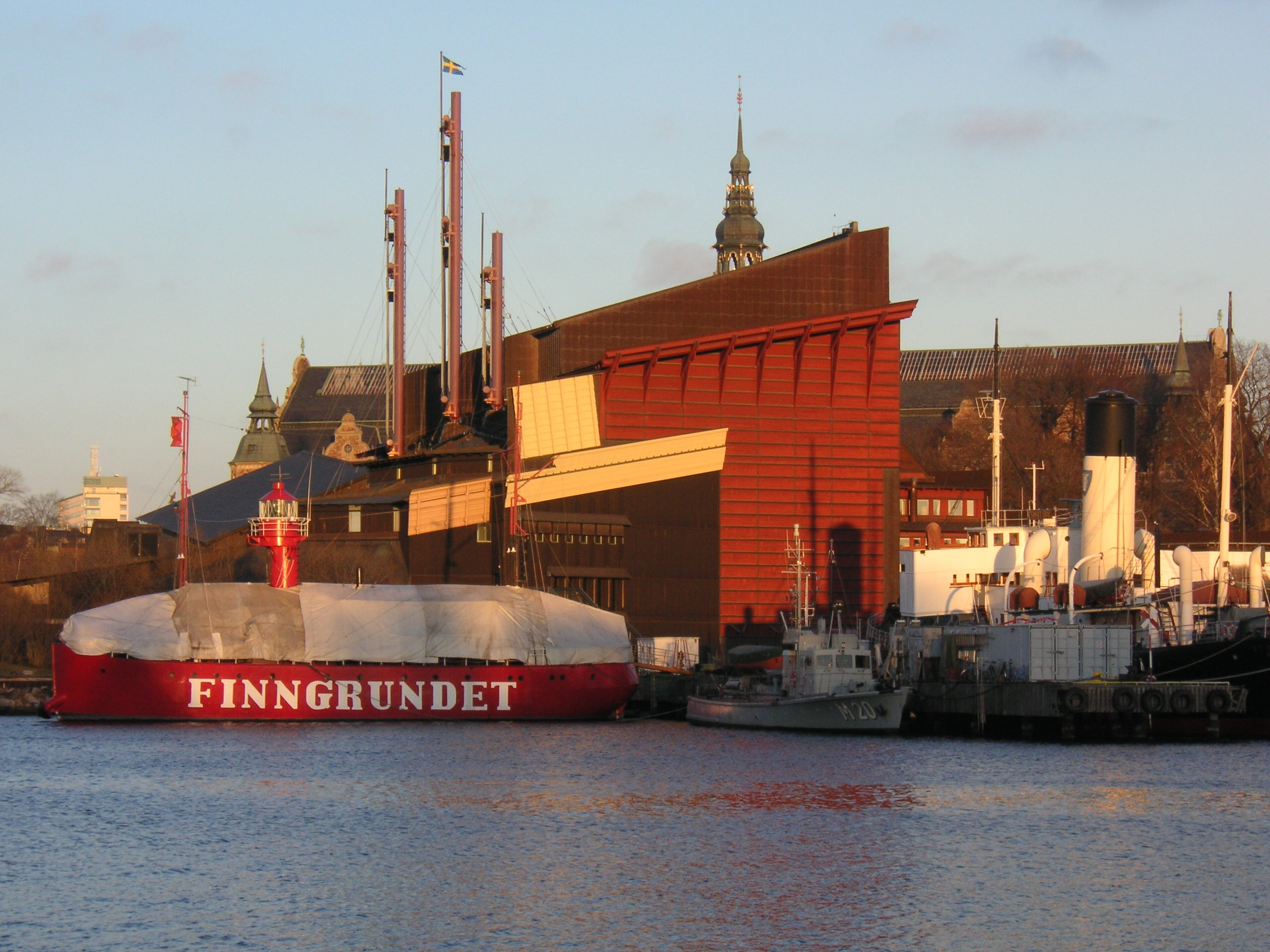 Vasamuseet från Skeppsholmen